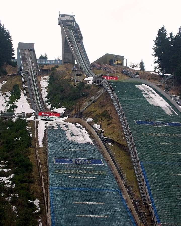 Schanzenanlage Kanzlersgrund in Oberhof, zugeschnittene Version von File:Hans Renner Schanze Oberhof Schanzenanlage.JPG